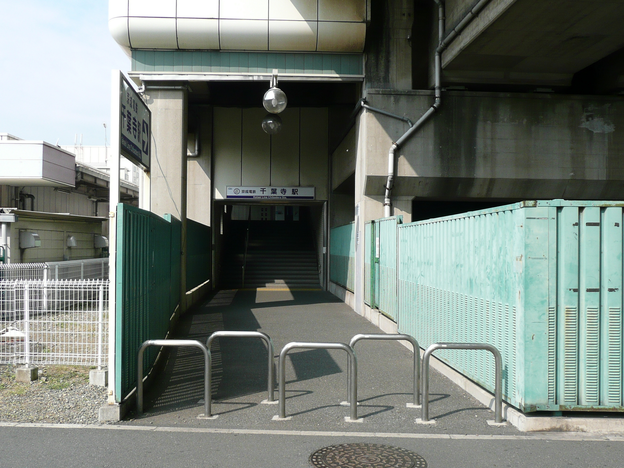 千葉寺駅蘇我側出入口